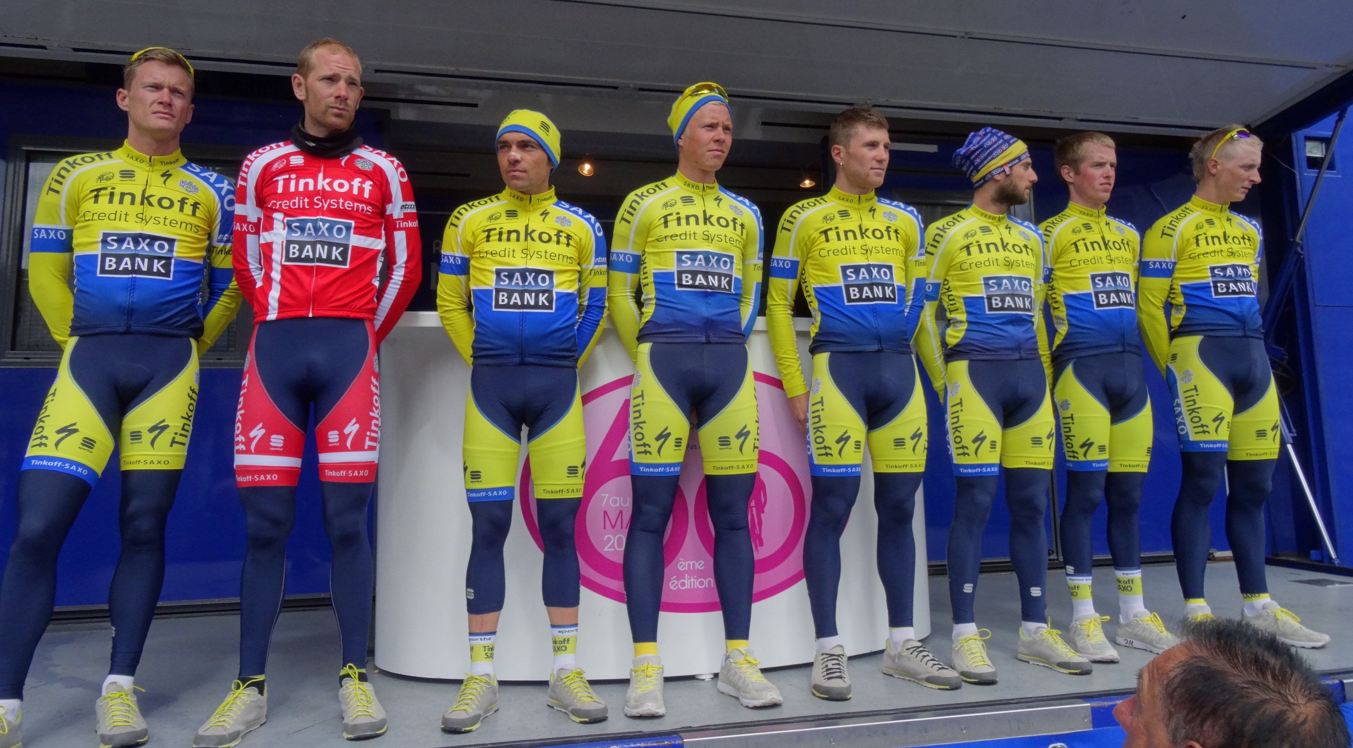 Reportage photographique réalisé le mercredi 7 mai 2014 au départ de la première étape de l'édition 2014 des Quatre jours de Dunkerque à Dunkerque, Nord, Nord-Pas-de-Calais, France. Depicted people: Matti Breschel, Michael Mørkøv, Oliver Zaugg, Michael Valgren, Michal Kolář, Manuele Boaro, Jesper Hansen and Marko Kump Depicted team: Tinkoff-Saxo